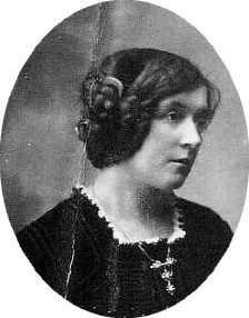 Anna Boudová-Suchardová, malířka květin, keramička a textilní výtvarnice